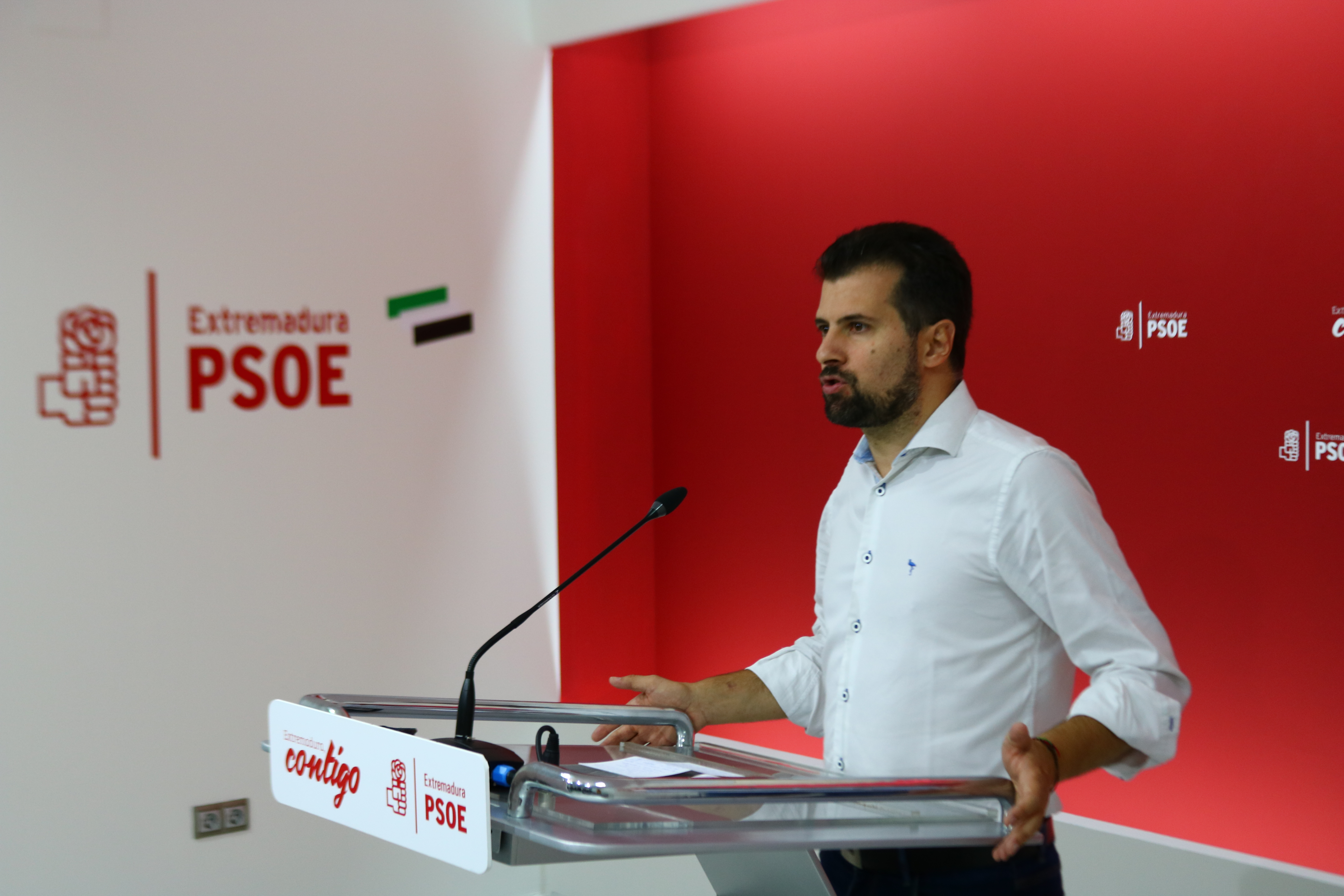 El secretario general del PSOE de Castilla y León, Luis Tudanca y el secretario general del PSOE de Extremadura, Guillermo Fernández Vara